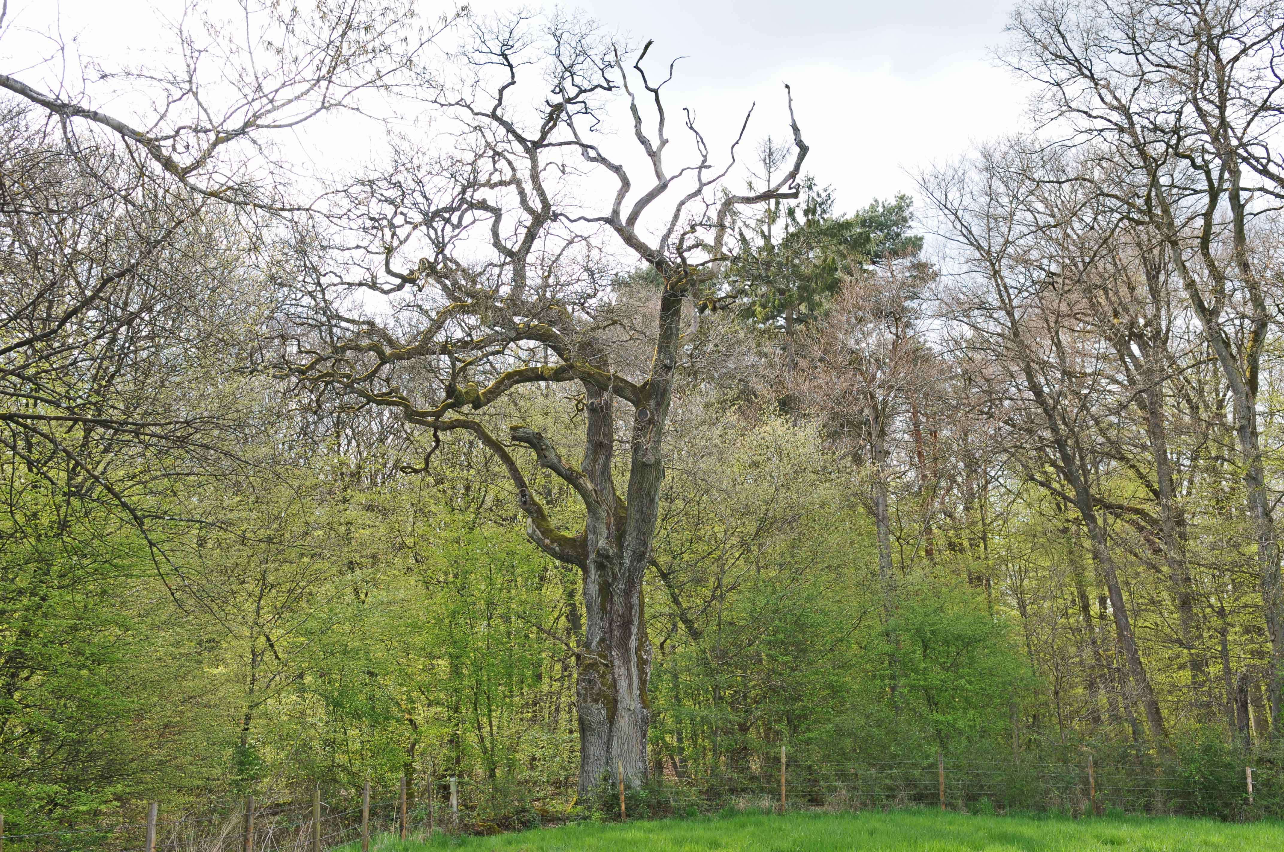 Eech zu Lenneng. Eech Lenneg + Kategorie:Gemeng Lenneng